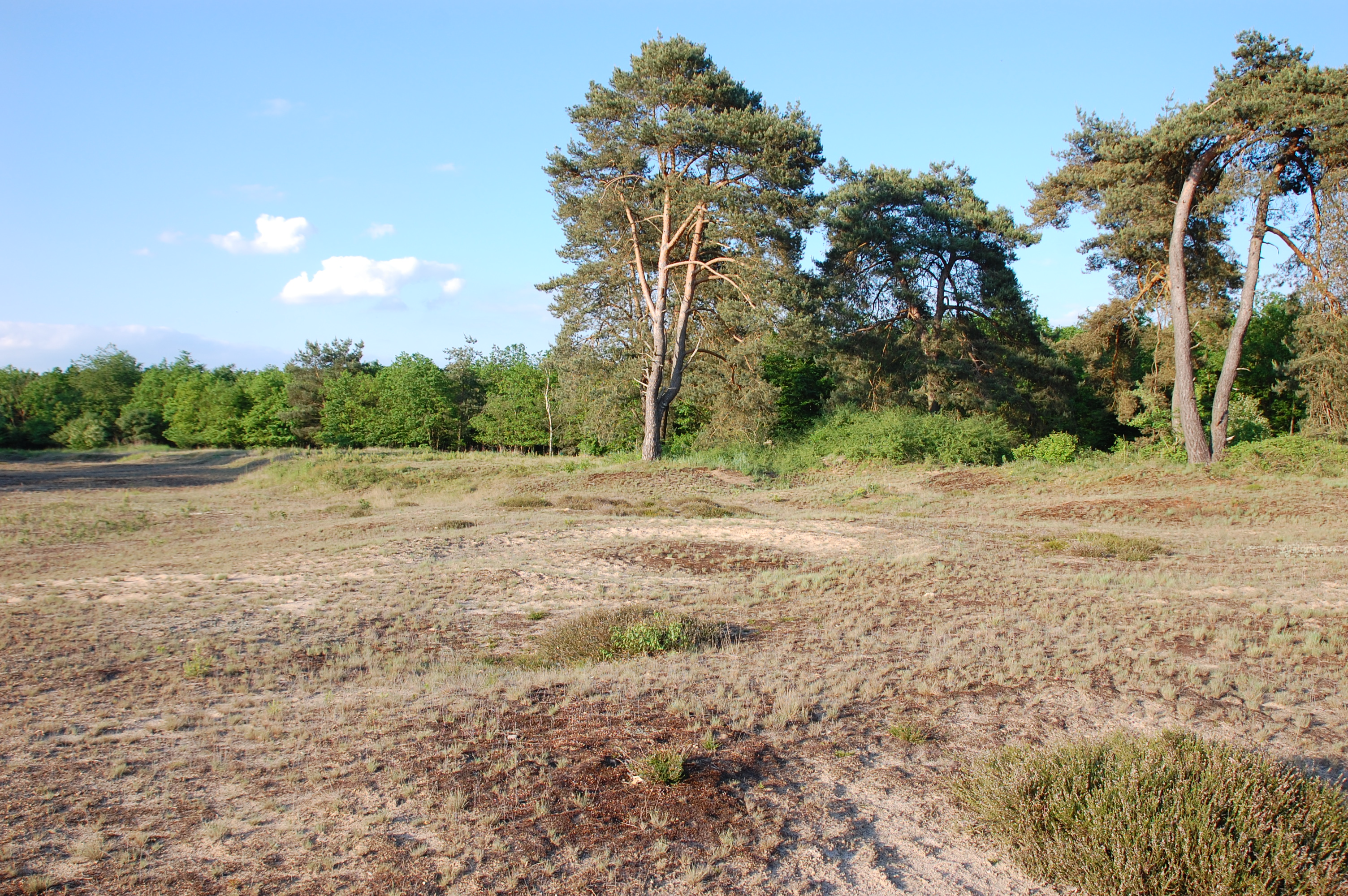 NSG-00439.01 / Naturschutzgebiet "Alzenauer Sande, Gerichtsplatz" in Alzenau-Hörstein, Landkreis Aschaffenburg, Bayern